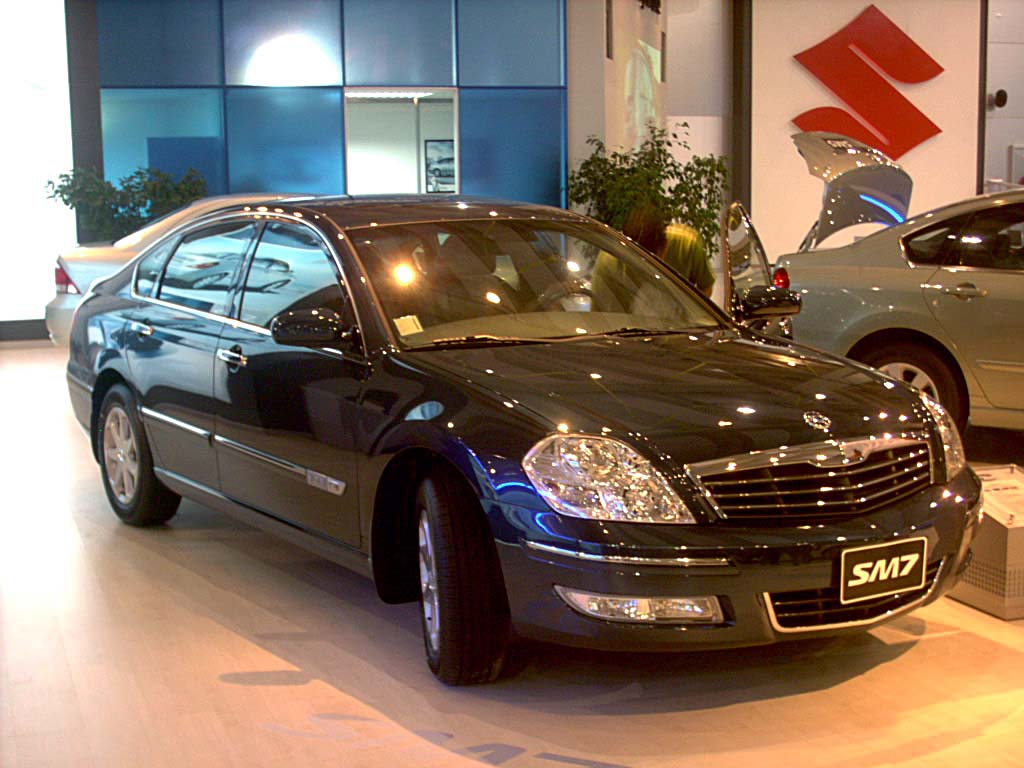 Samsung SM7